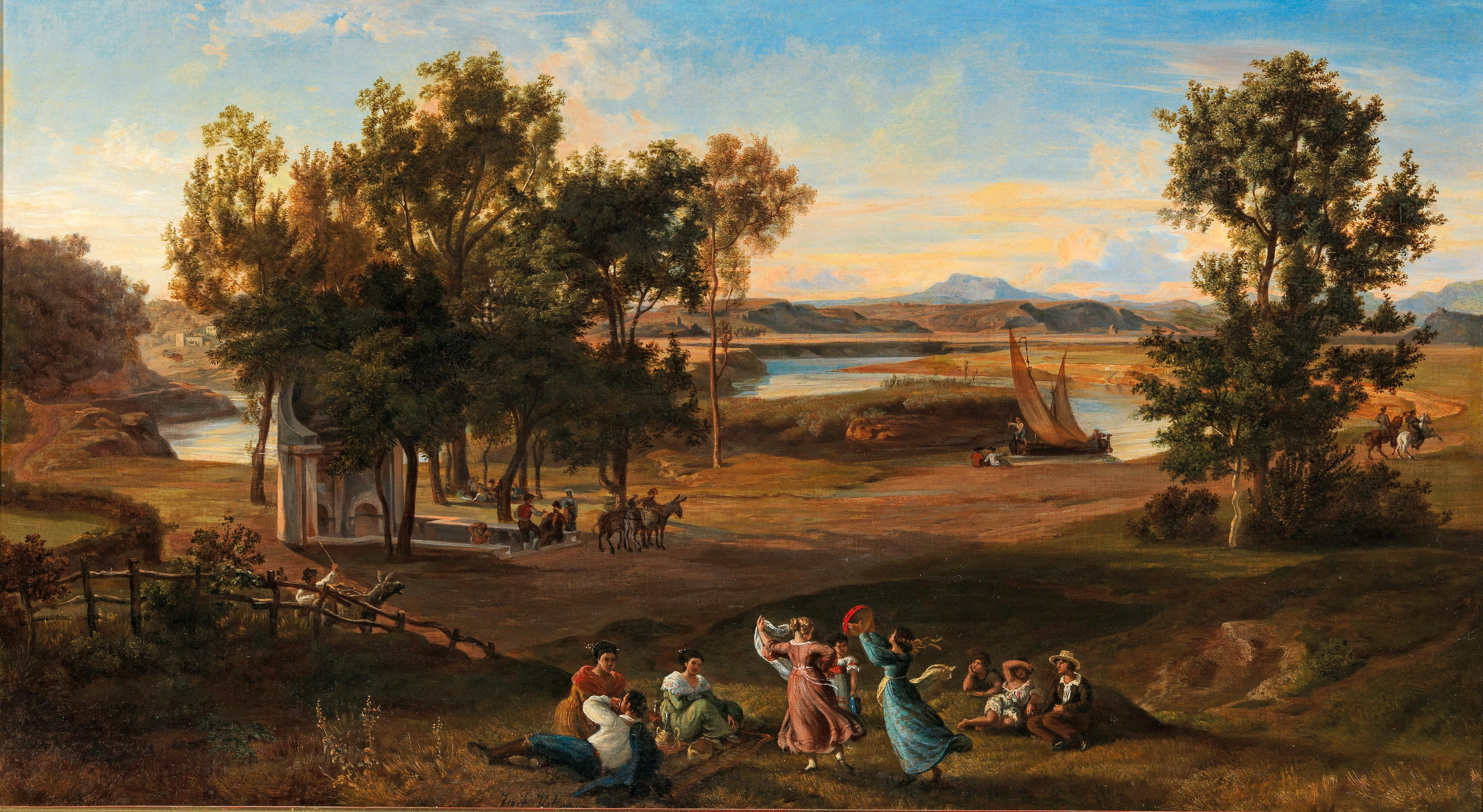 Italienische Landschaft mit rastendem und tanzendem Landvolk, signiert Josef Hoffmann, Öl auf Leinwand, 54,5 x 98 cm